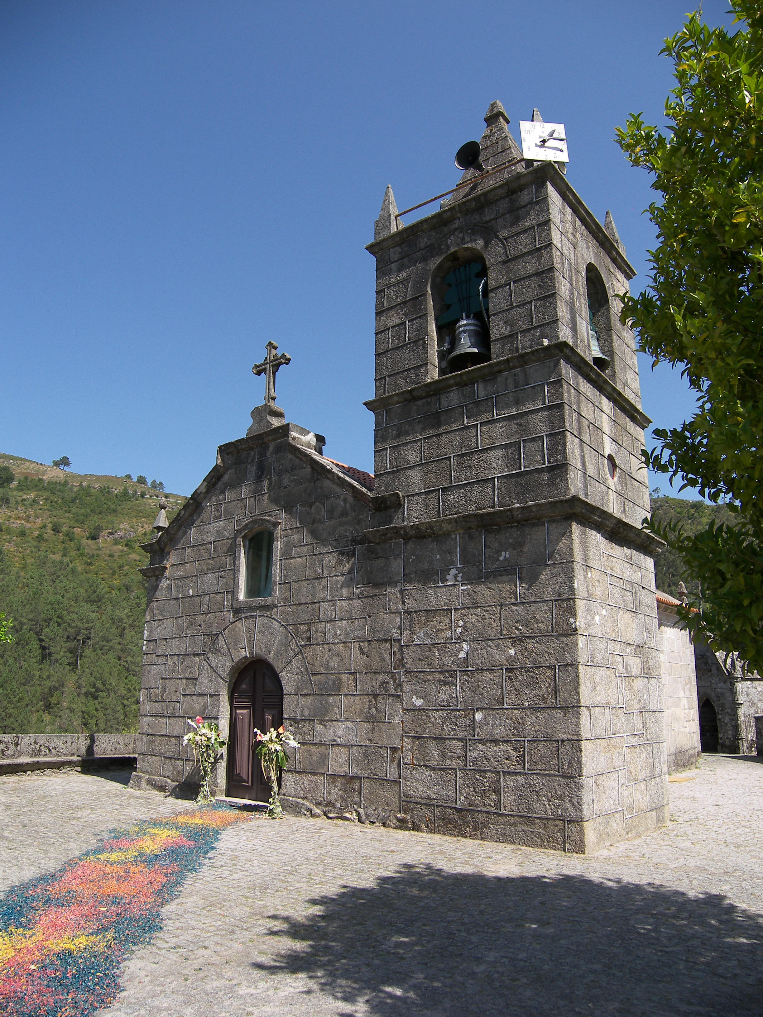 Kirche in Sistelo